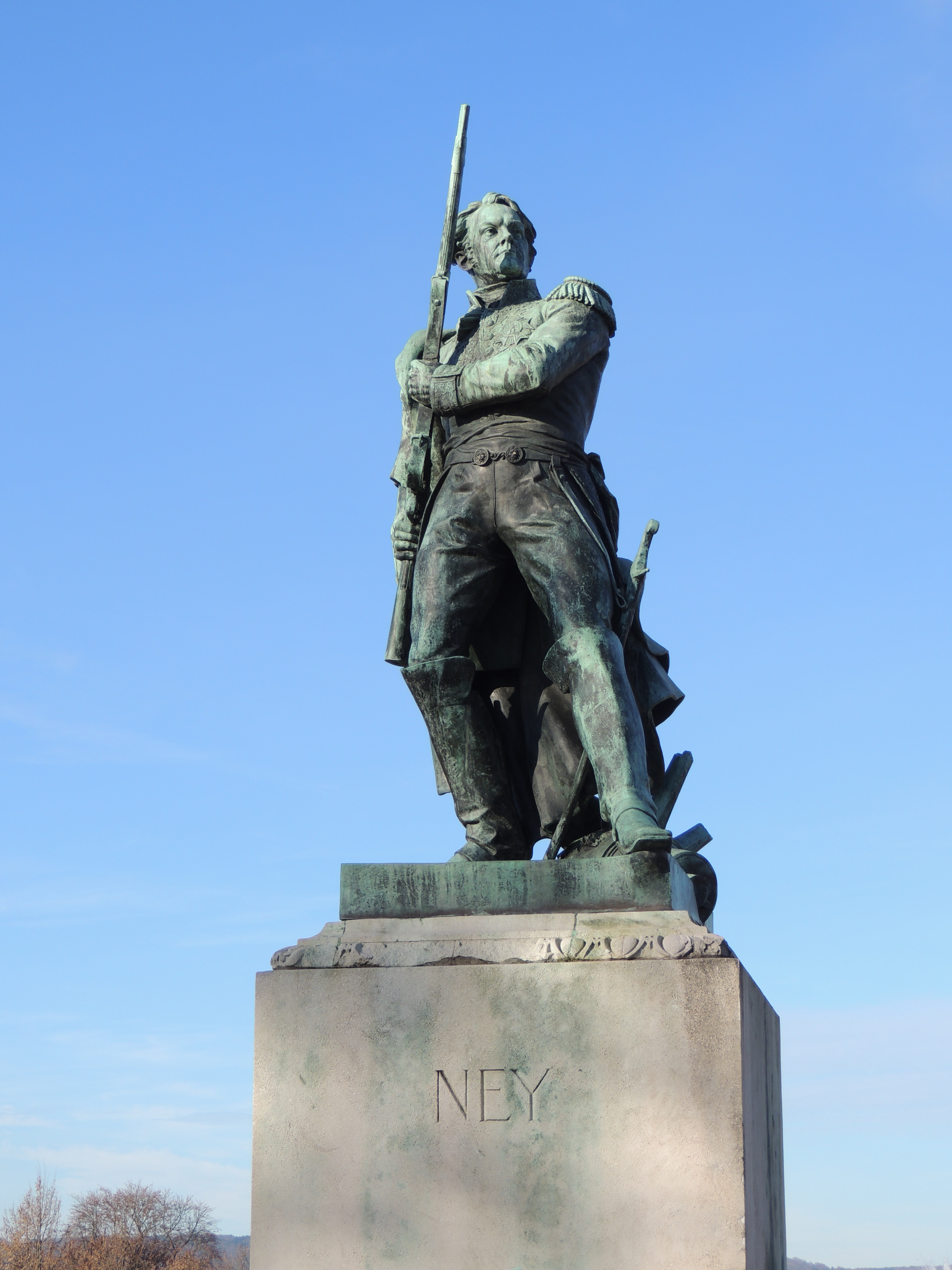 Statue de Ney à Metz